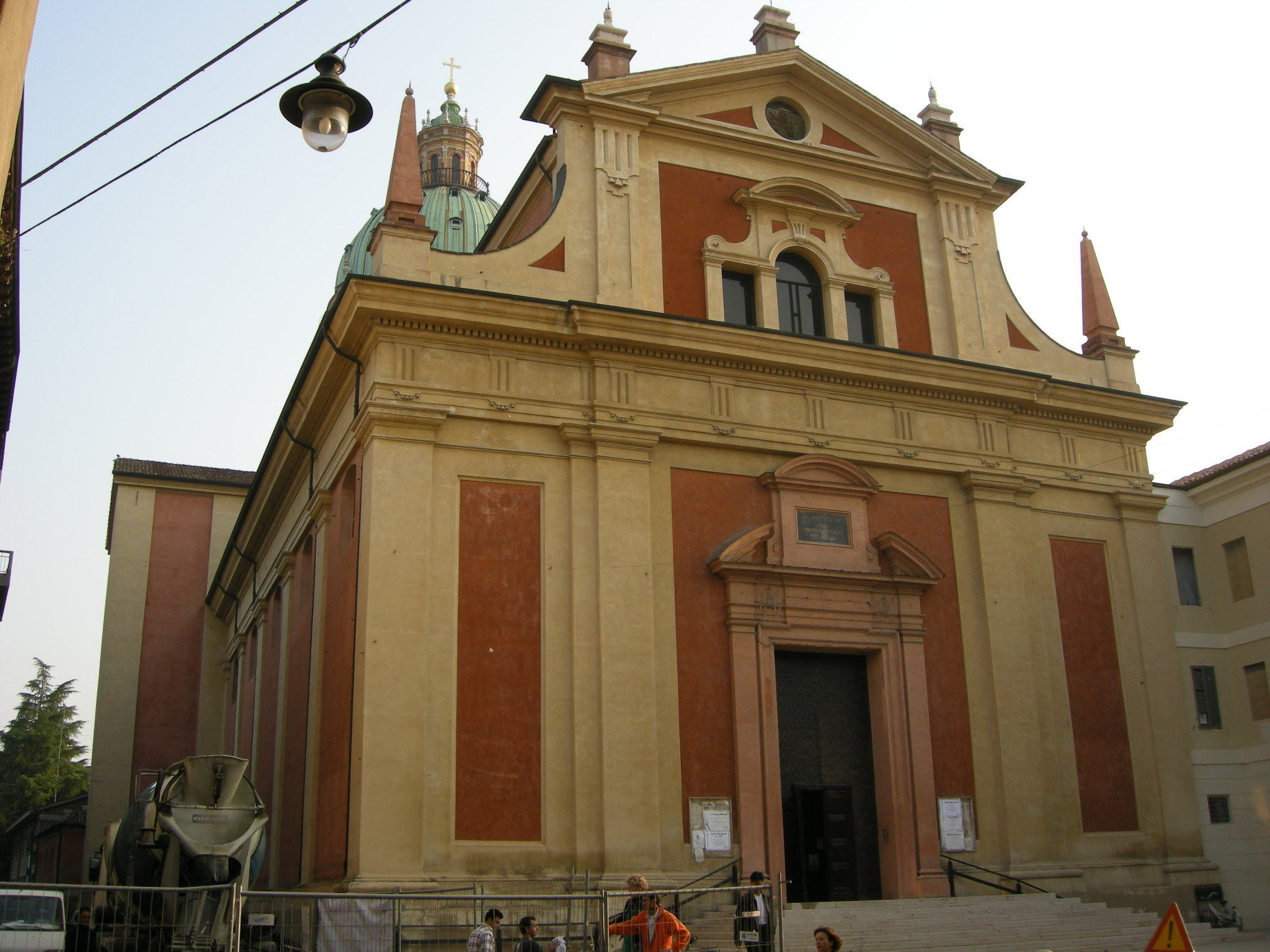 San Pietro (Reggio Emilia)